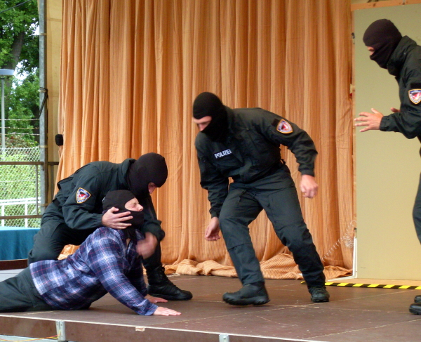 Polizeilicher Zugriff. Vorführung des MEK BKA beim 2. Tag der offenen Tür im Bundeskriminalamt (BKA) in Wiesbaden am 19. Juni 2010.